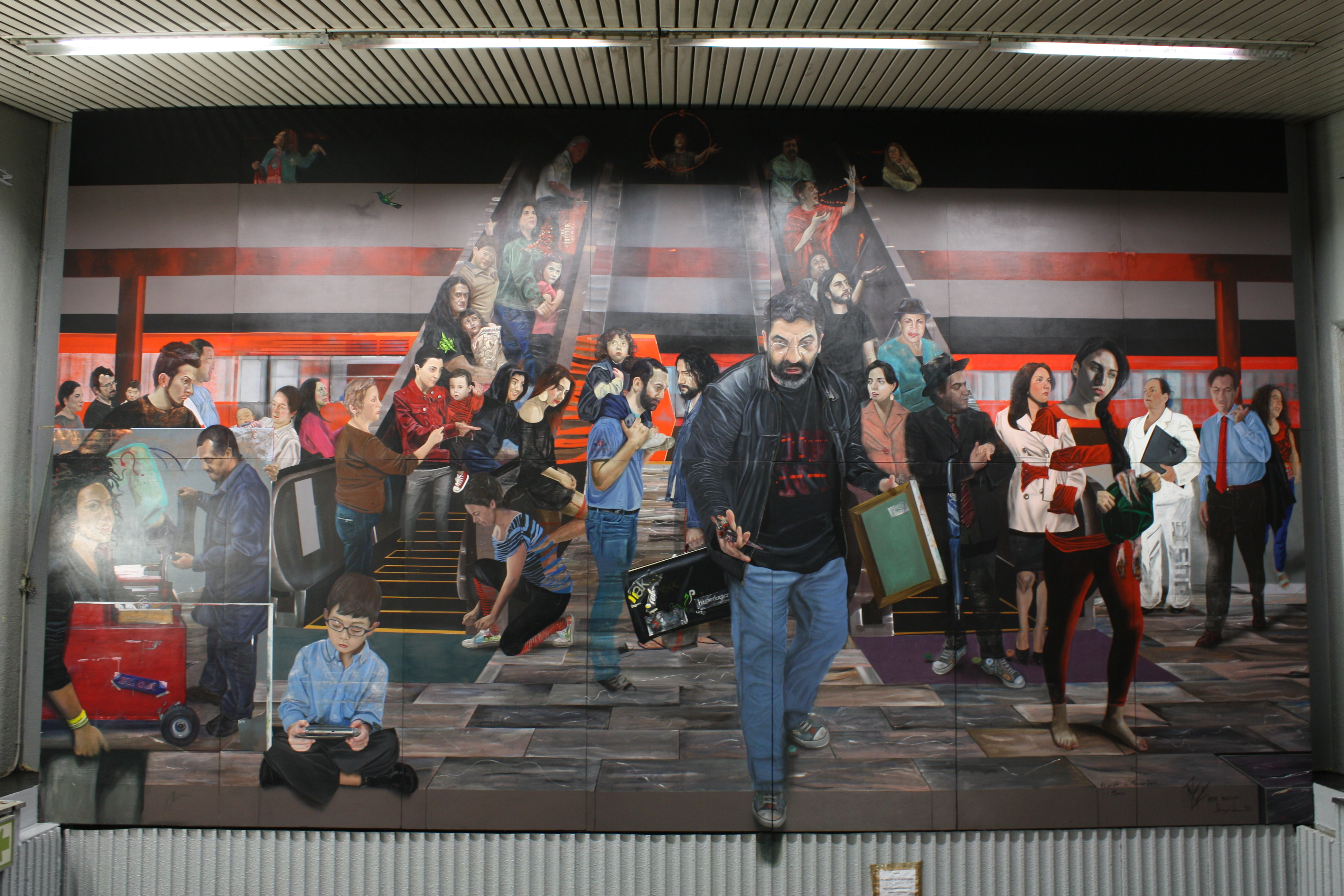 Fotografía del Mural: "El Andén de Ouroboros" Ubicado en la estación Metro Tlatelolco